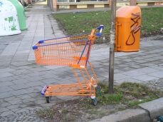 Ein orangener Einkaufswagen neben einem orangenen Mülleimer